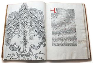 трактат середньовічного юриста Йоганна Андреа «Про древа кровного споріднення, близькості, а також про спорідненість духовну ...», виданий у Нюрнберзі близько 1476 р.